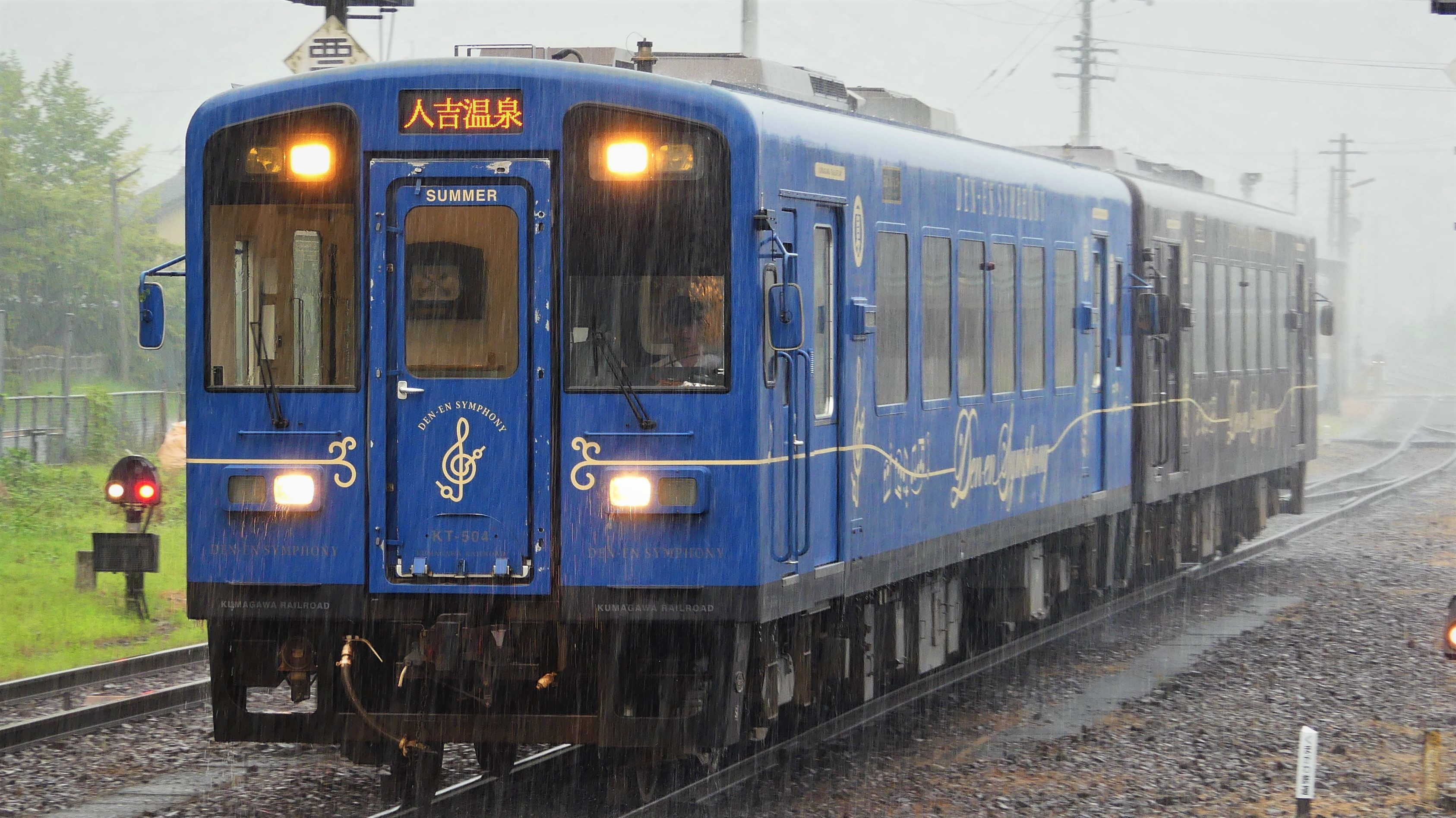 人吉温泉駅に入線するKT-500形